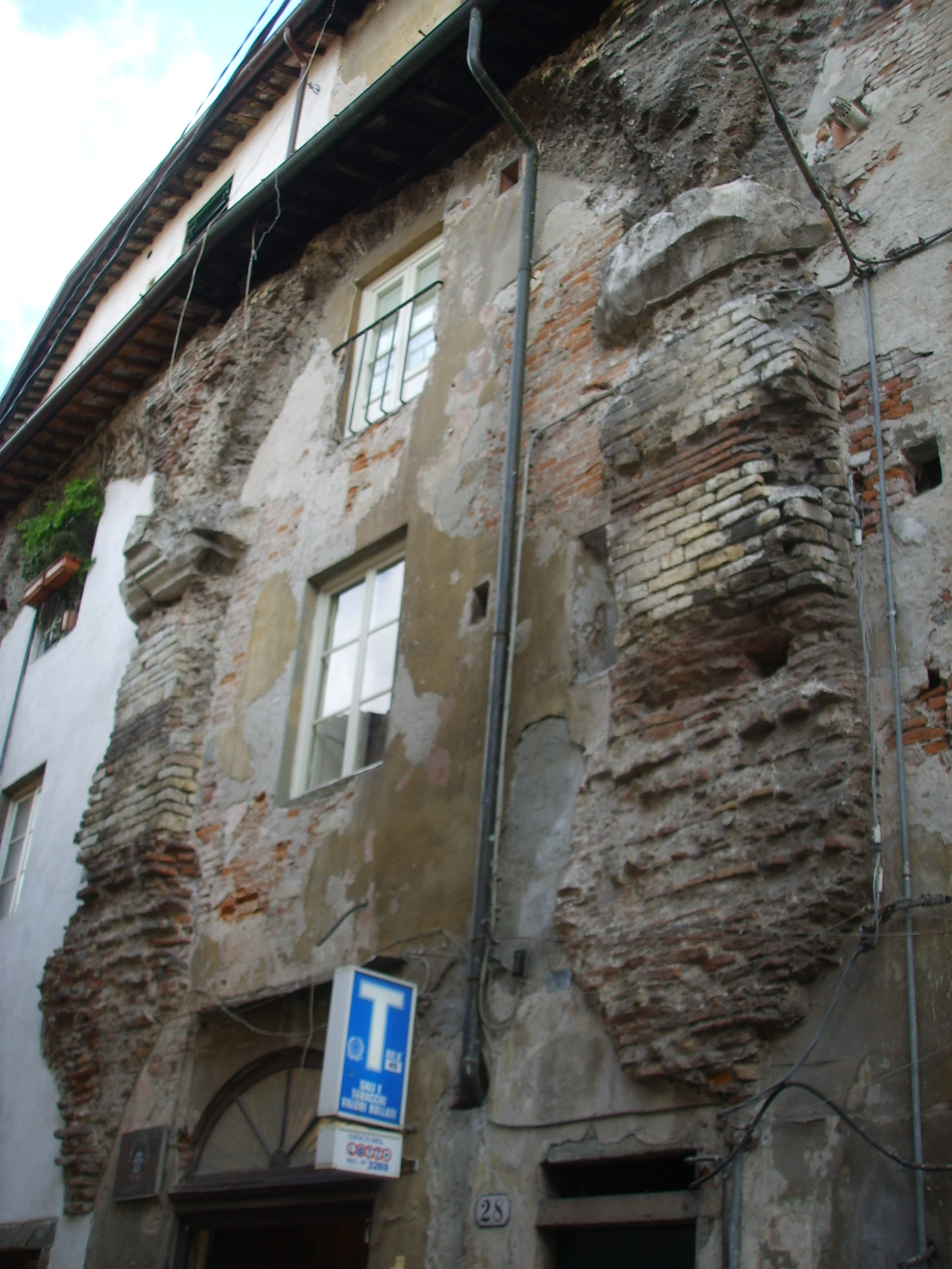 Anfiteatro romano di lucca, esterno